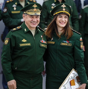 Министр обороны Сергей Шойгу присвоил очередное воинское звание Елене Исимбаевой